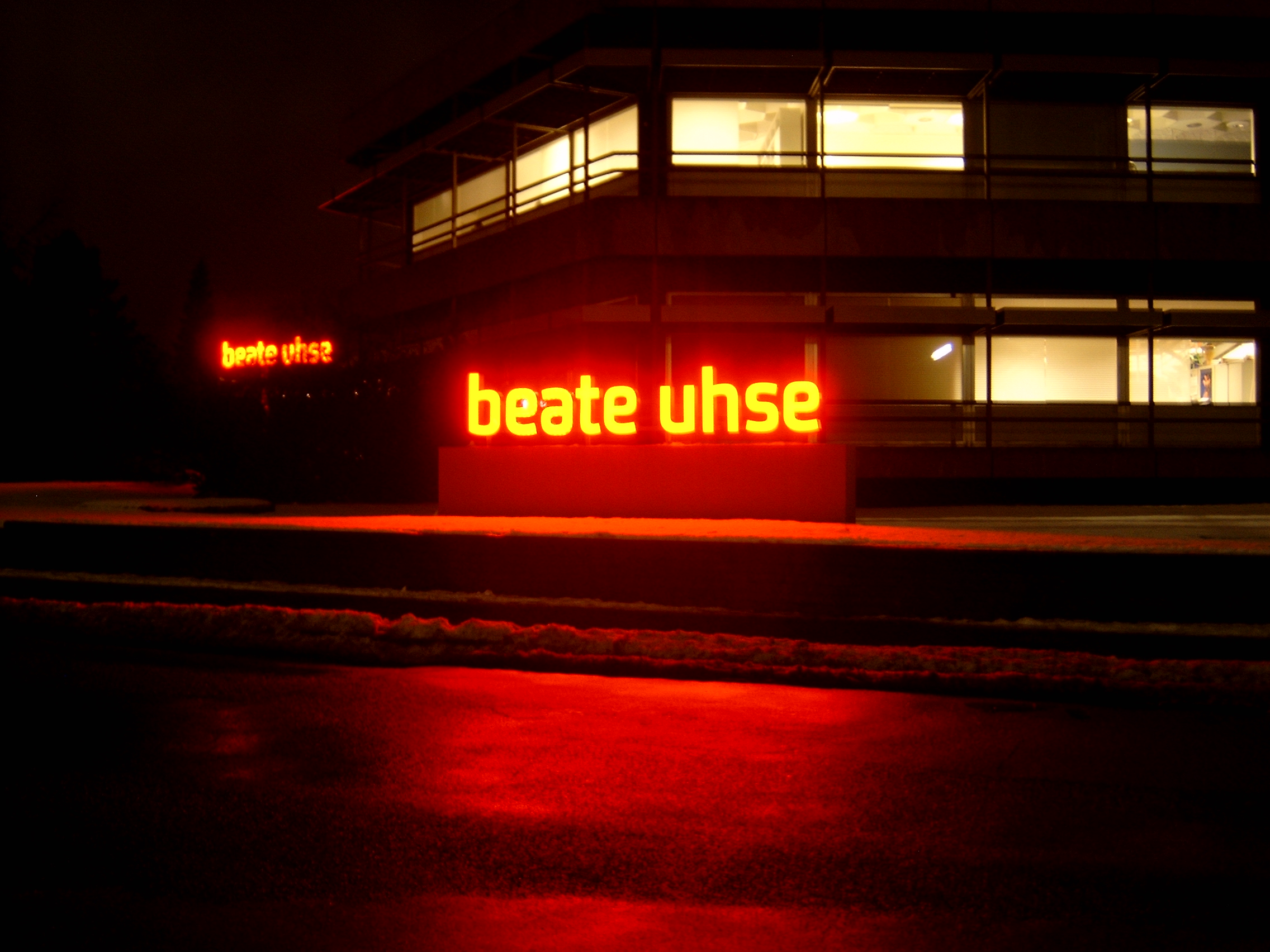 Beate Uhse, Firmensitz in Flensburg; Gutenbergstraße 12 24941 Flensburg